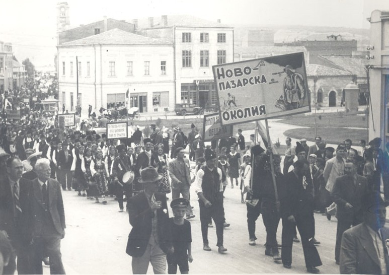 4-ти селскостопански културен и национален събор, 28 - 29 август 1938 г., гр. Варна. Парад на участниците в събора по ул. Княз Борис І. На преден план са представителите на Новопазарска околия.